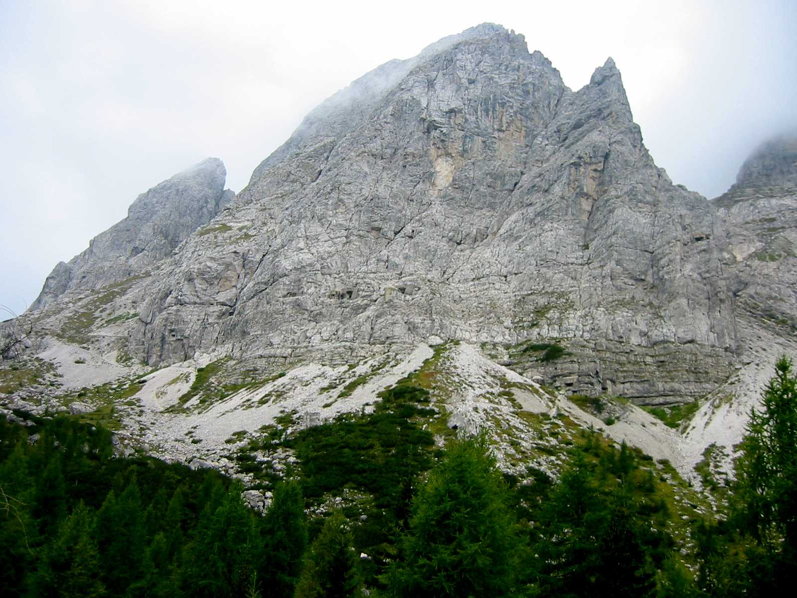 Foto scattata in settembre 2004 da Fantasy :-)